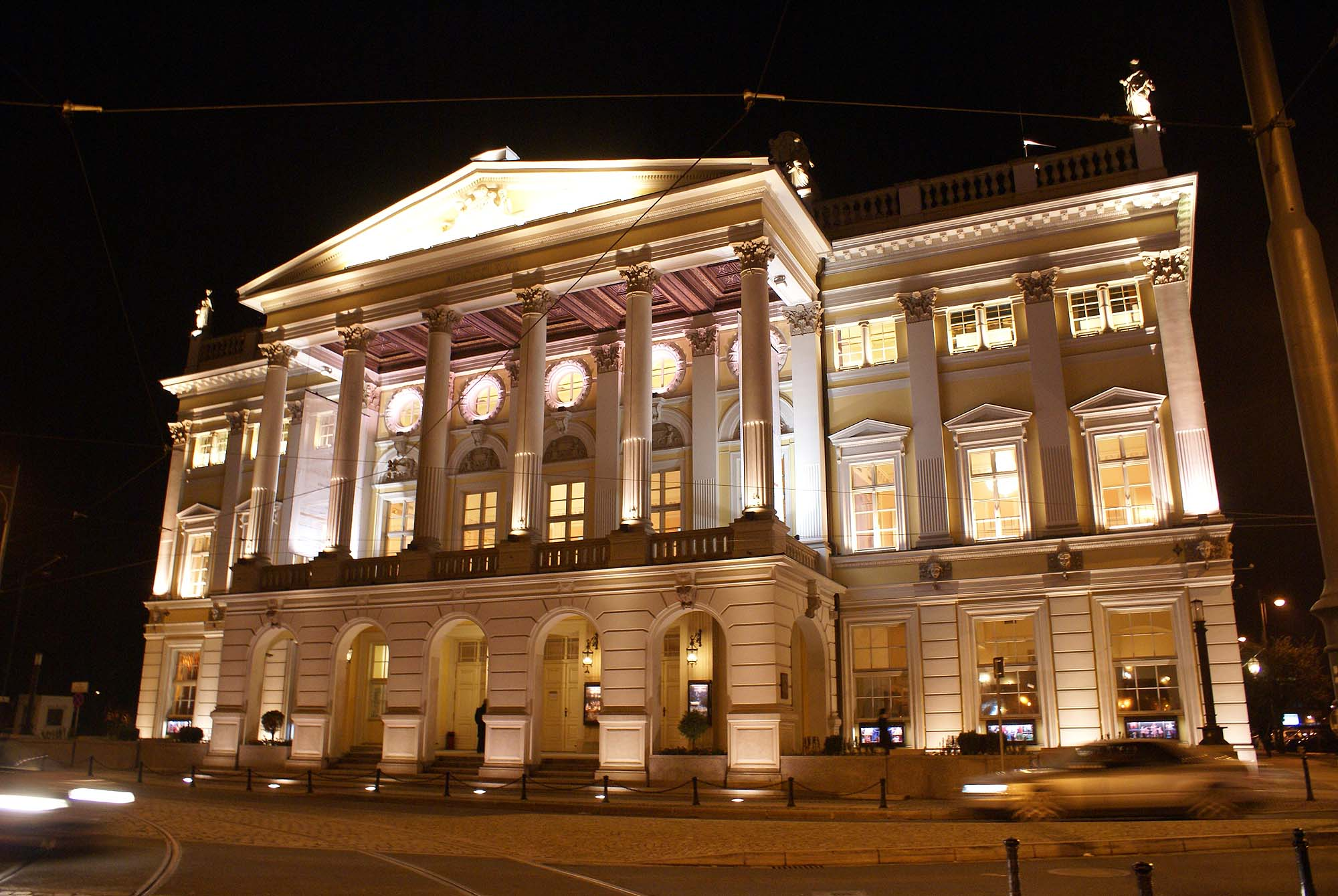 Wrocław, opera, 1837, 1871, 1955